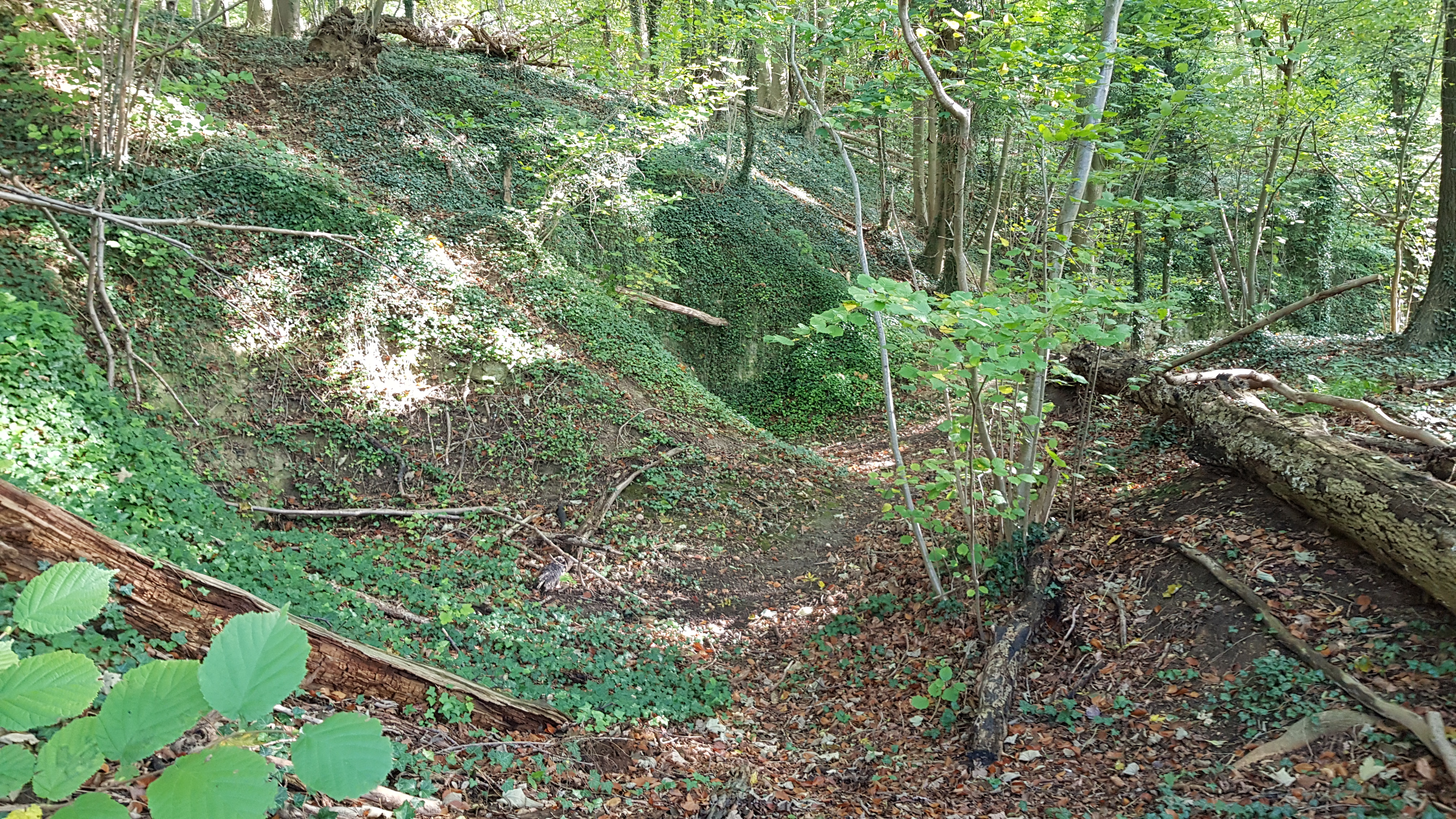 Vallenberggroeve (Biebosch), Valkenburg, Nederland